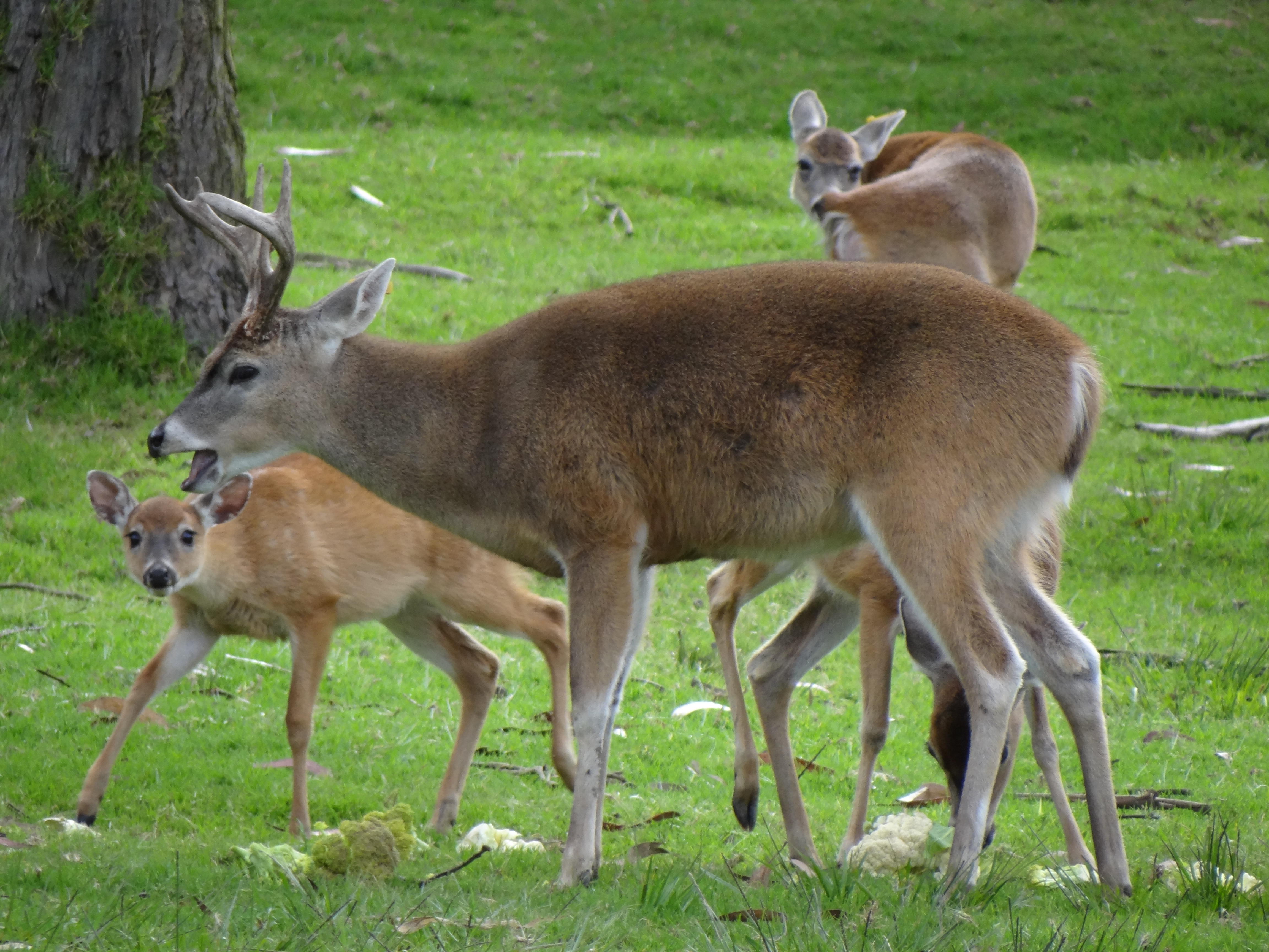 Grupo de venados de cola blanca (subespecie Odocoileus virginianus goudotii) en el Parque Jaime Duque, Tocancipá, Cundinamarca, Colombia